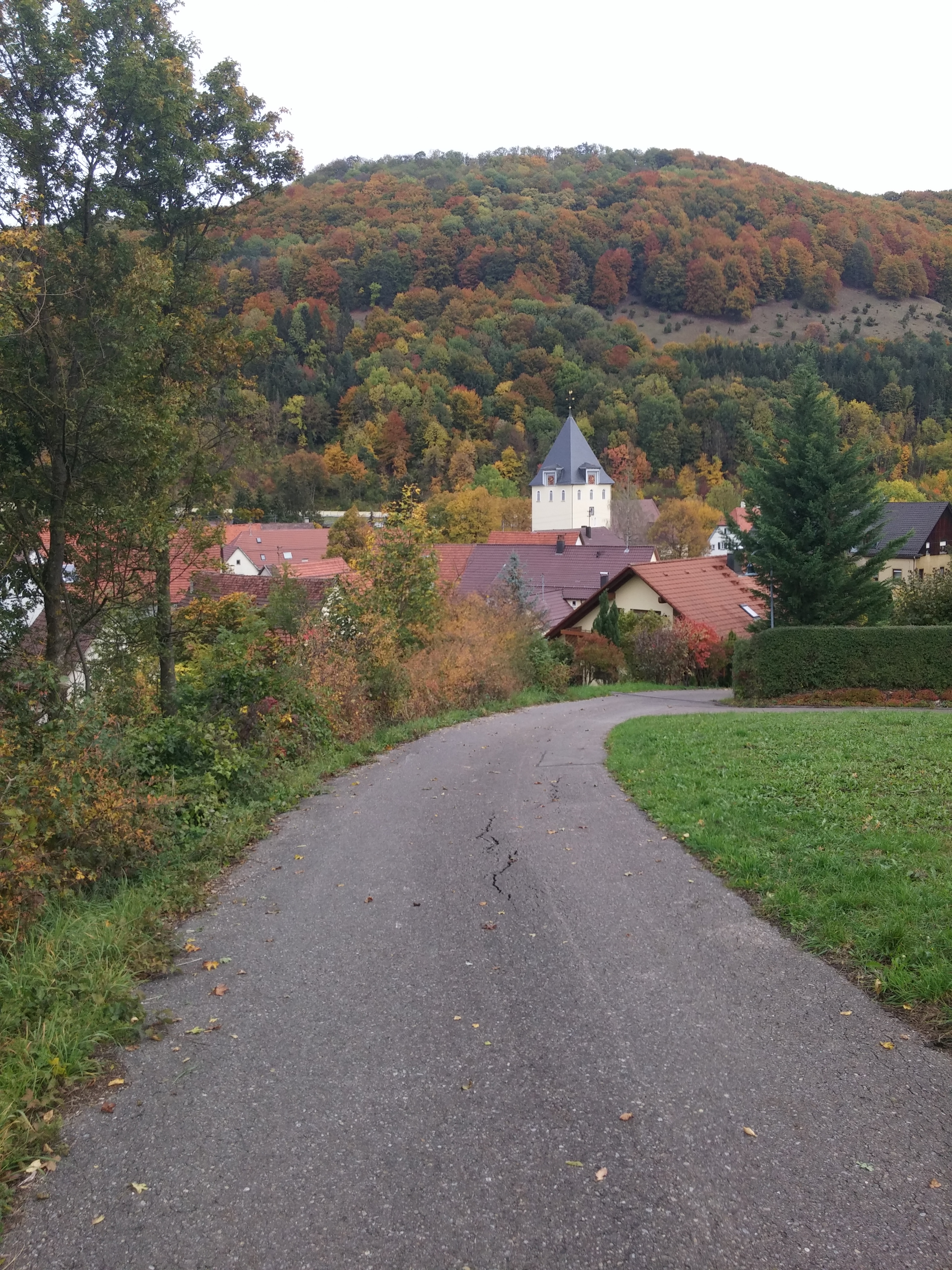 Die Martinskirche von Westen aus gesehen